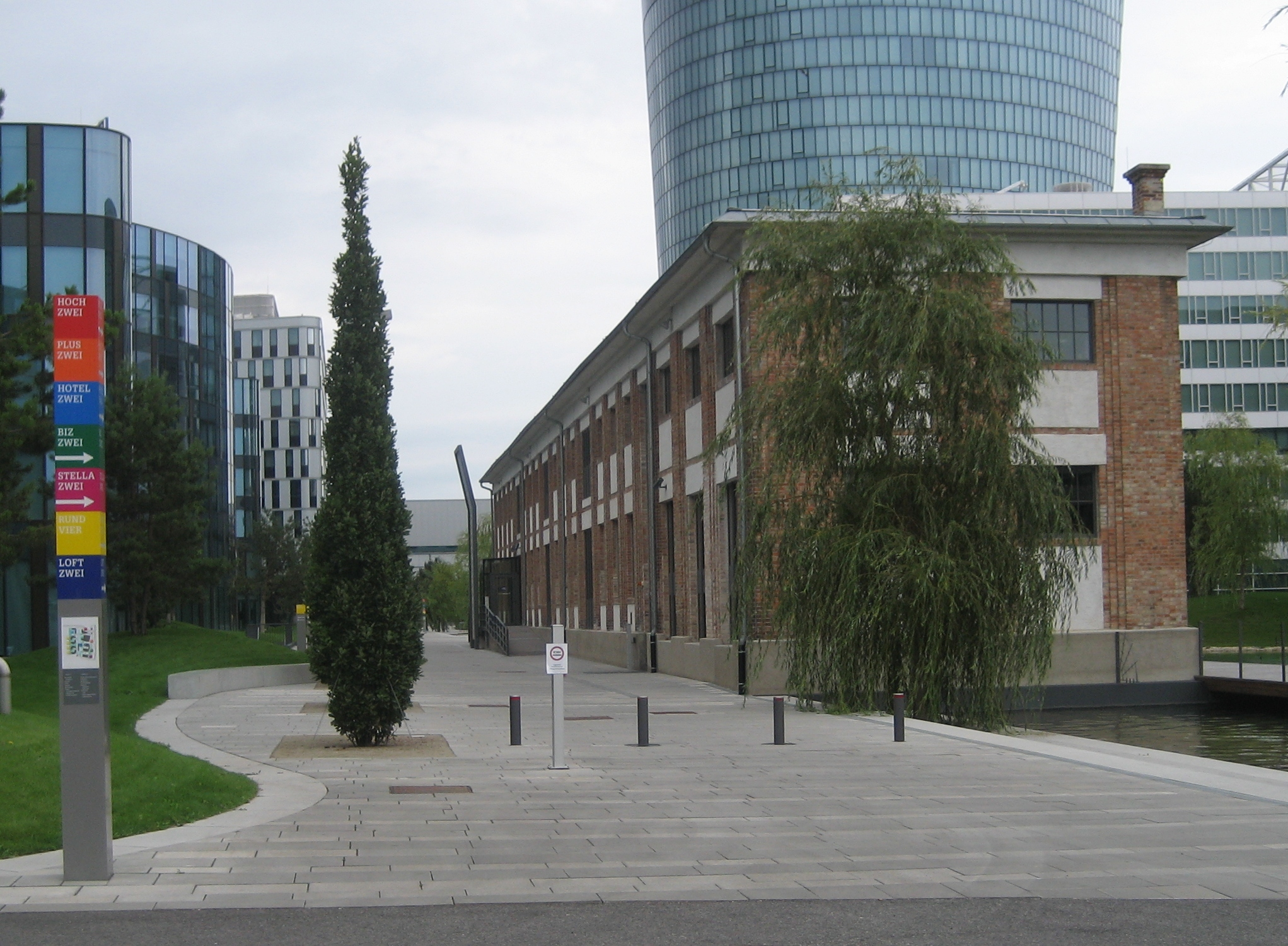 das Haus Stella-Klein-Löw-Weg 8 in der Leopoldstadt in Wien